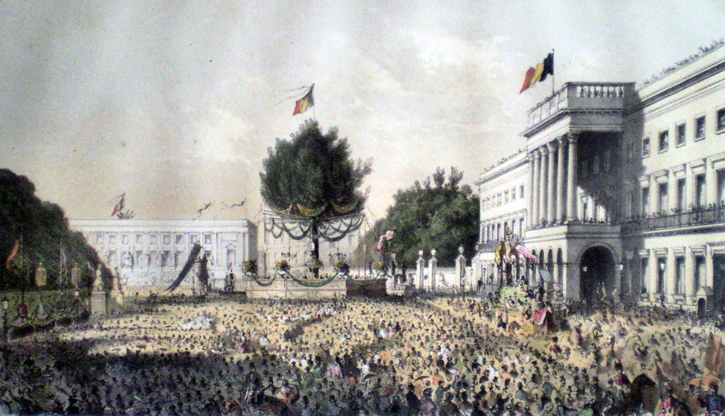 Décoration de la place des Palais à Bruxelles le 21 juillexxx t 1856: Cérémonies et fêtes qui ont lieu à Bruxelles, du 21 au 23 juillet 1856, à l'occasion du XXV anniversaire de l'inauguration de sa majesté le Roi Léopold I Imprimé chez Gustave Simonau & William Toovey, édité par Jules Geruzet, libraire et photographe rue des Éperonniers, 6 à Bruxelles, 1856